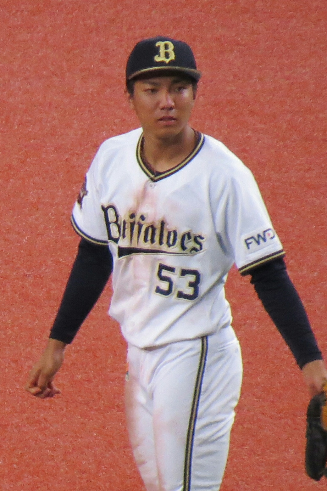 宜保翔20190923